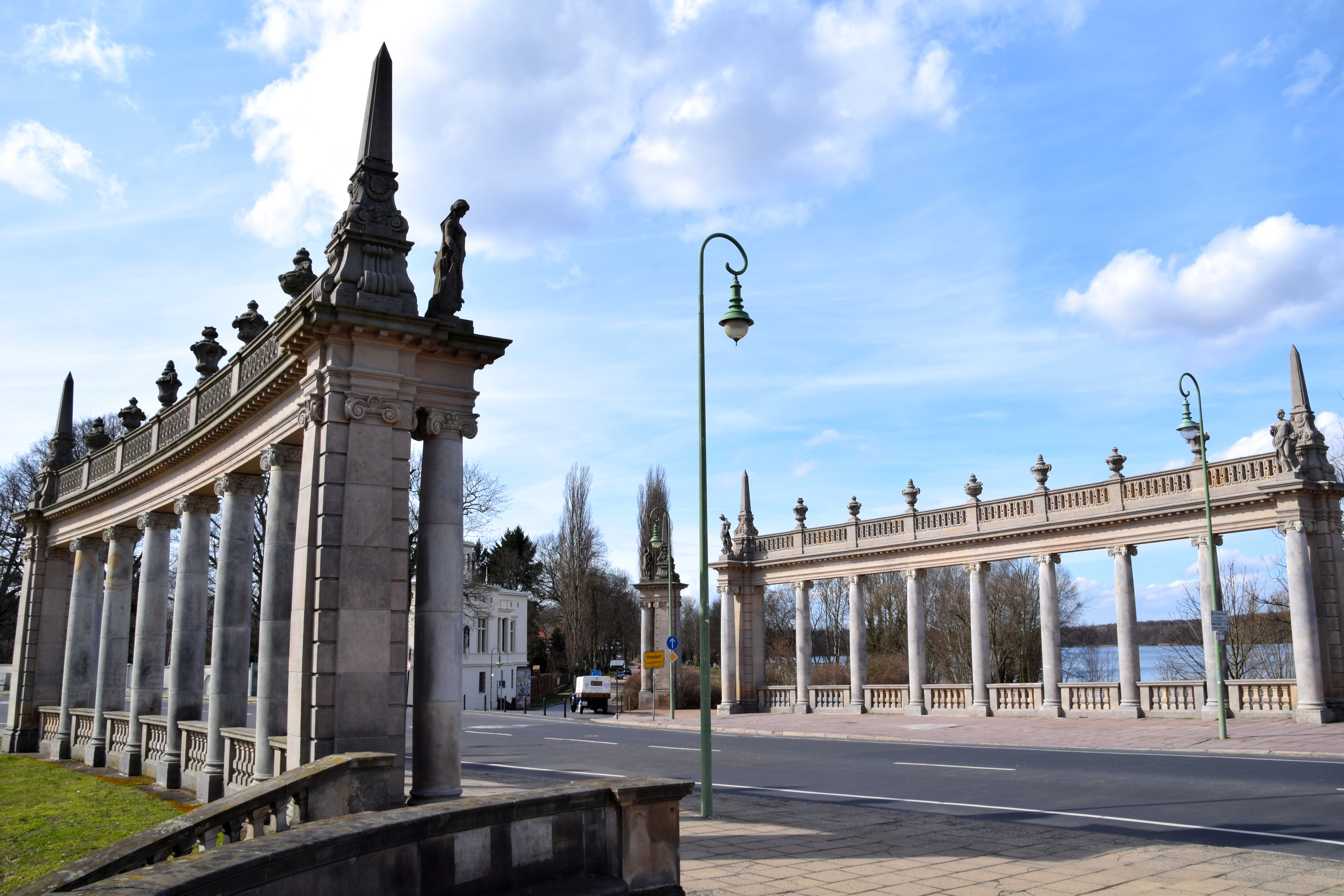 Die 1905 bis 1907 von dem Architekten und preußischen Baubeamten Eduard Fürstenau (* 1862; † 1938) entworfenen und stadtbildprägenden Kolonnaden an der Potsdamer Zufahrt zur Glienicker Brücke (Berliner Straße) Richtung Berlin.